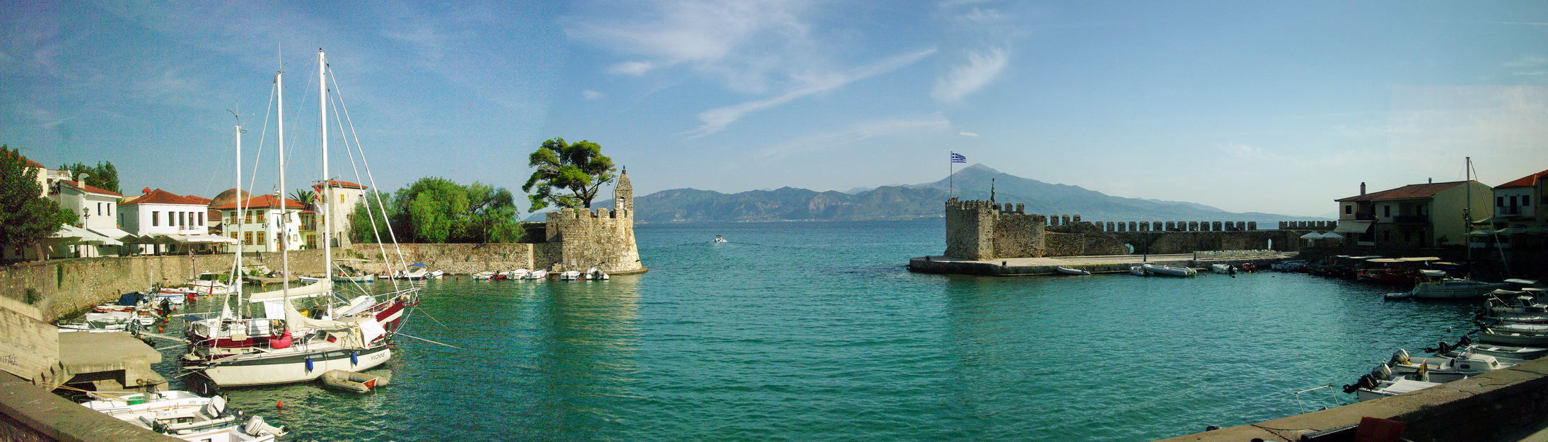 Hafen von Nafpaktos